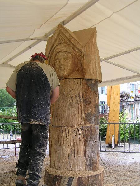 Passion du bois, sculteur à Bréville